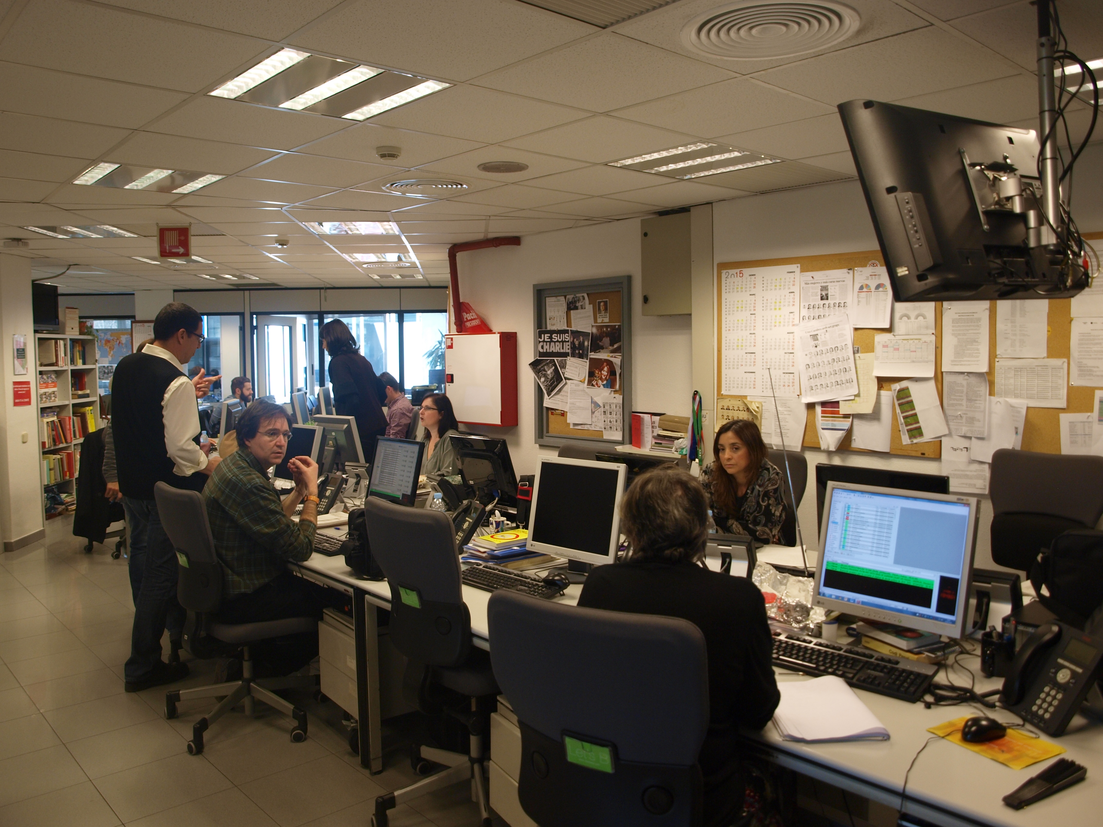 Redacció de Catalunya Ràdio